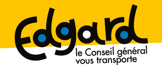 Logo du réseau interurbain de cars du Gard appelé Edgard.